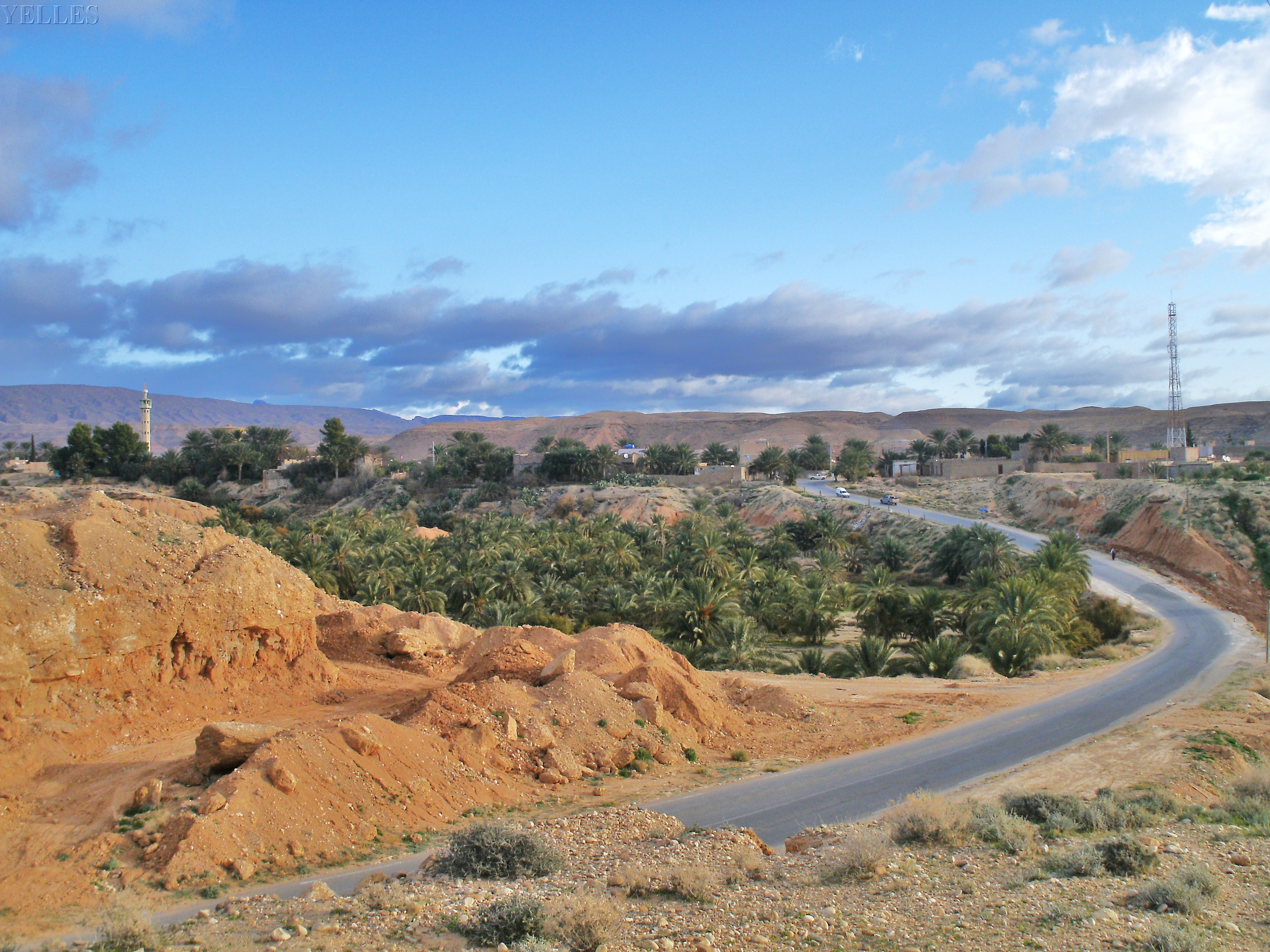 Le village de Baniane dans les Aurès en Algérie